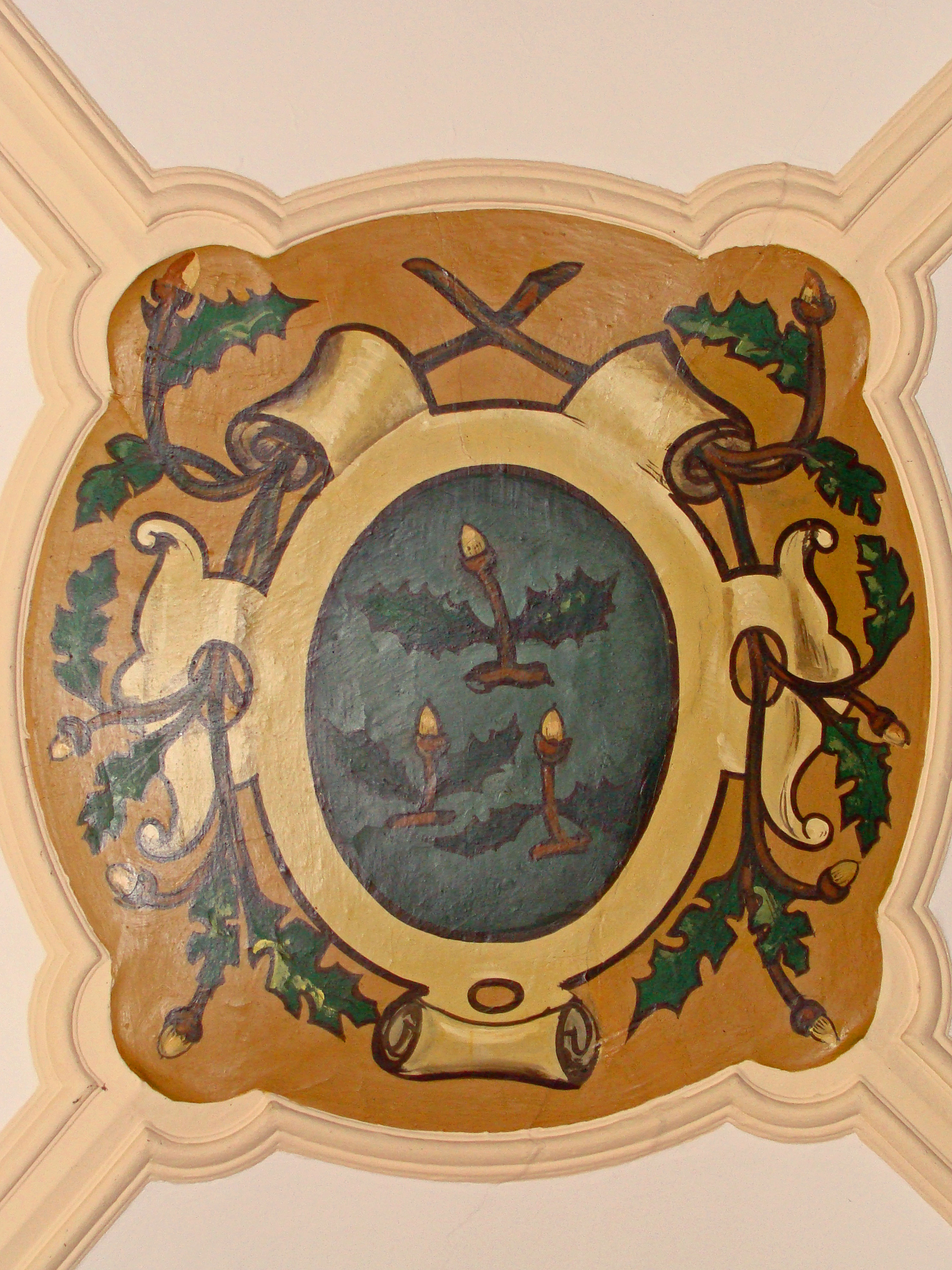 Abbaye Saint-Martin-des-Glandières, clé de voûte avec blason abbatial.